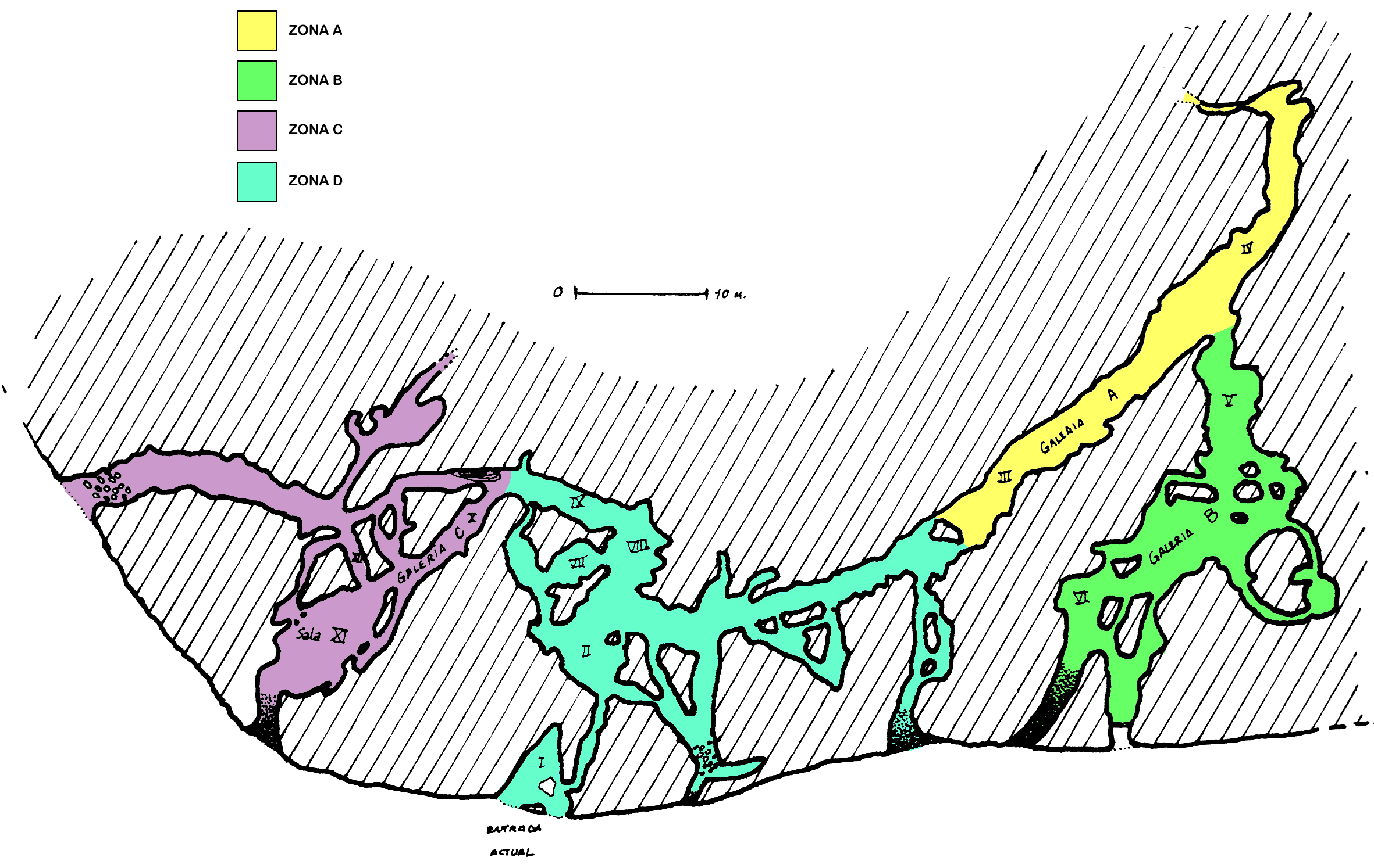 Plano de la Cueva de La Pasiega en el monte Castillo, localidad de Puente Viesgo (Cantabria, España)